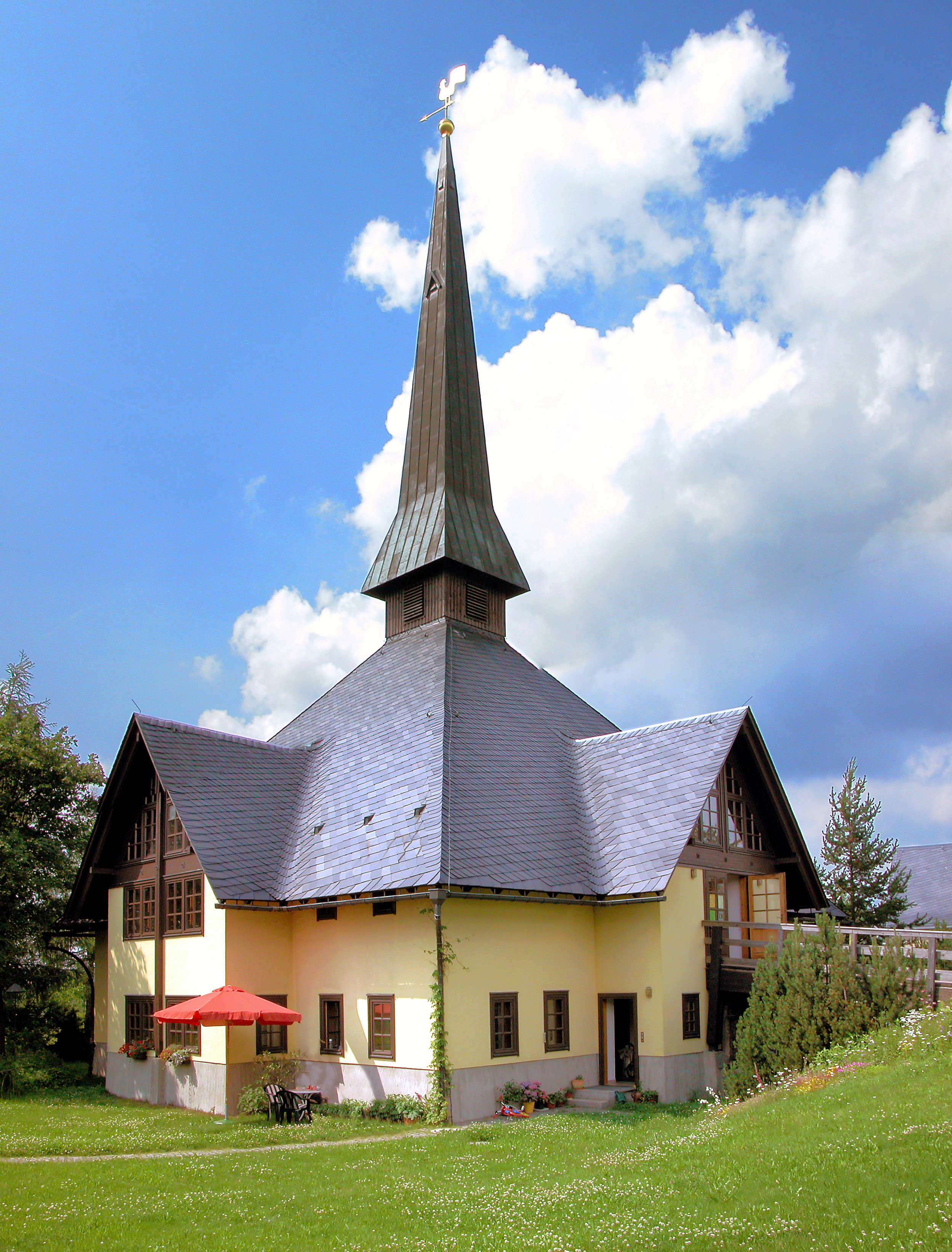 04.07.2009 01773 Altenberg (Sachs.): Evangelische Kirche, Hirschsprunger Straße (GMP: 50.766336,13.756438). Erbaut von 1989-91 nach Plänen von Manfred Fehmel und Dr. Hermann Krüger, beide aus Dresden. [DSCN38149-38150]20090704100MDR.JPG(c)Blobelt